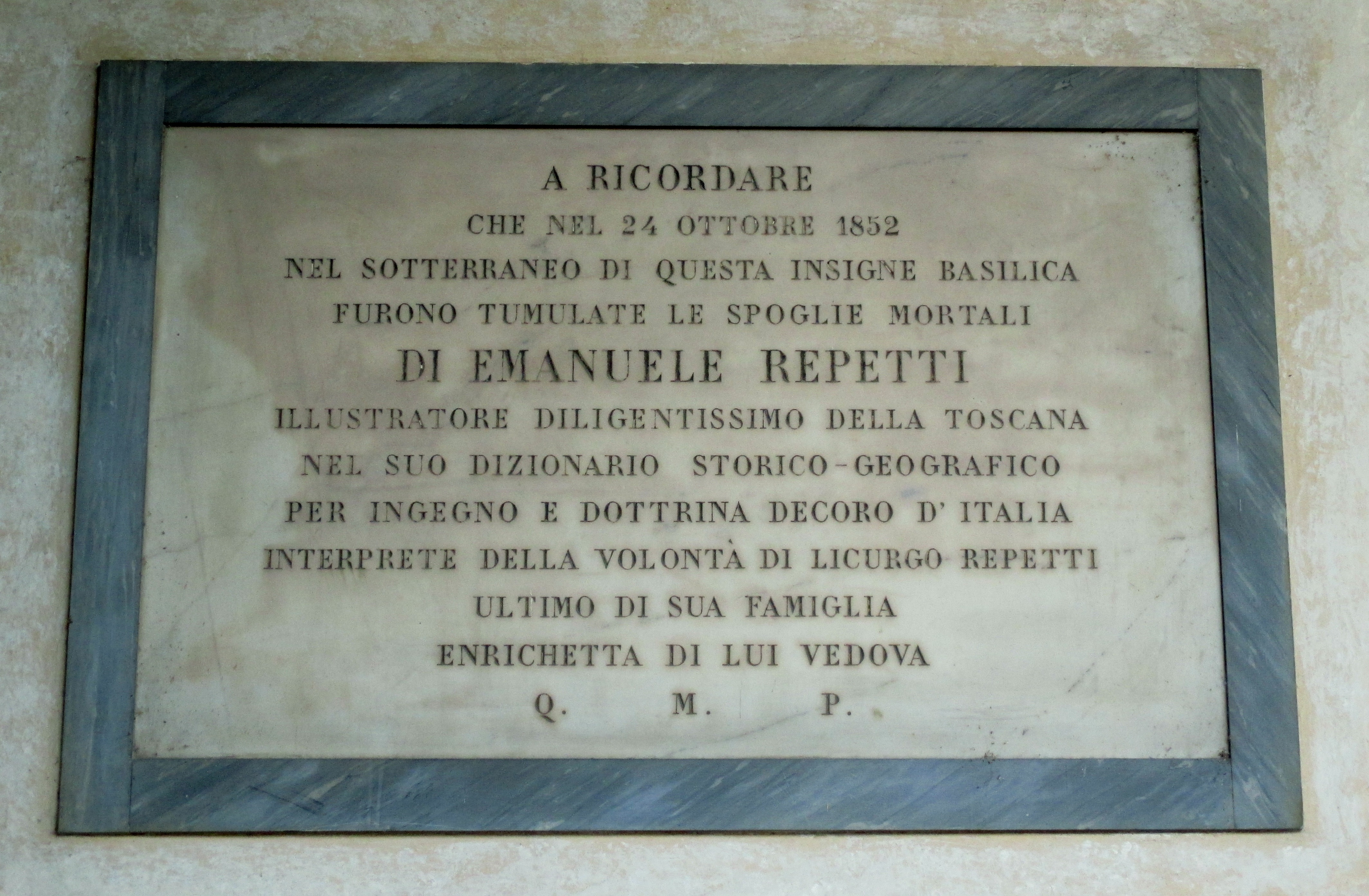 Firenze, chiostro di San Lorenzo: epigrafe in memoria di Emanuele Repetti, sepolto nei sotterranei della basilica.